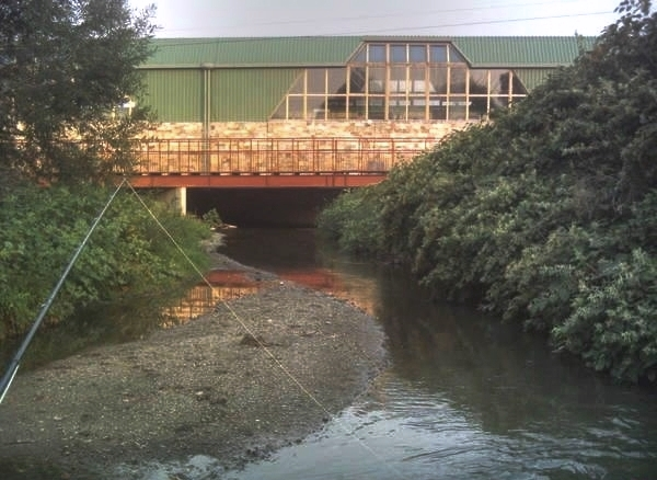 метростанция "Обеля", разположение